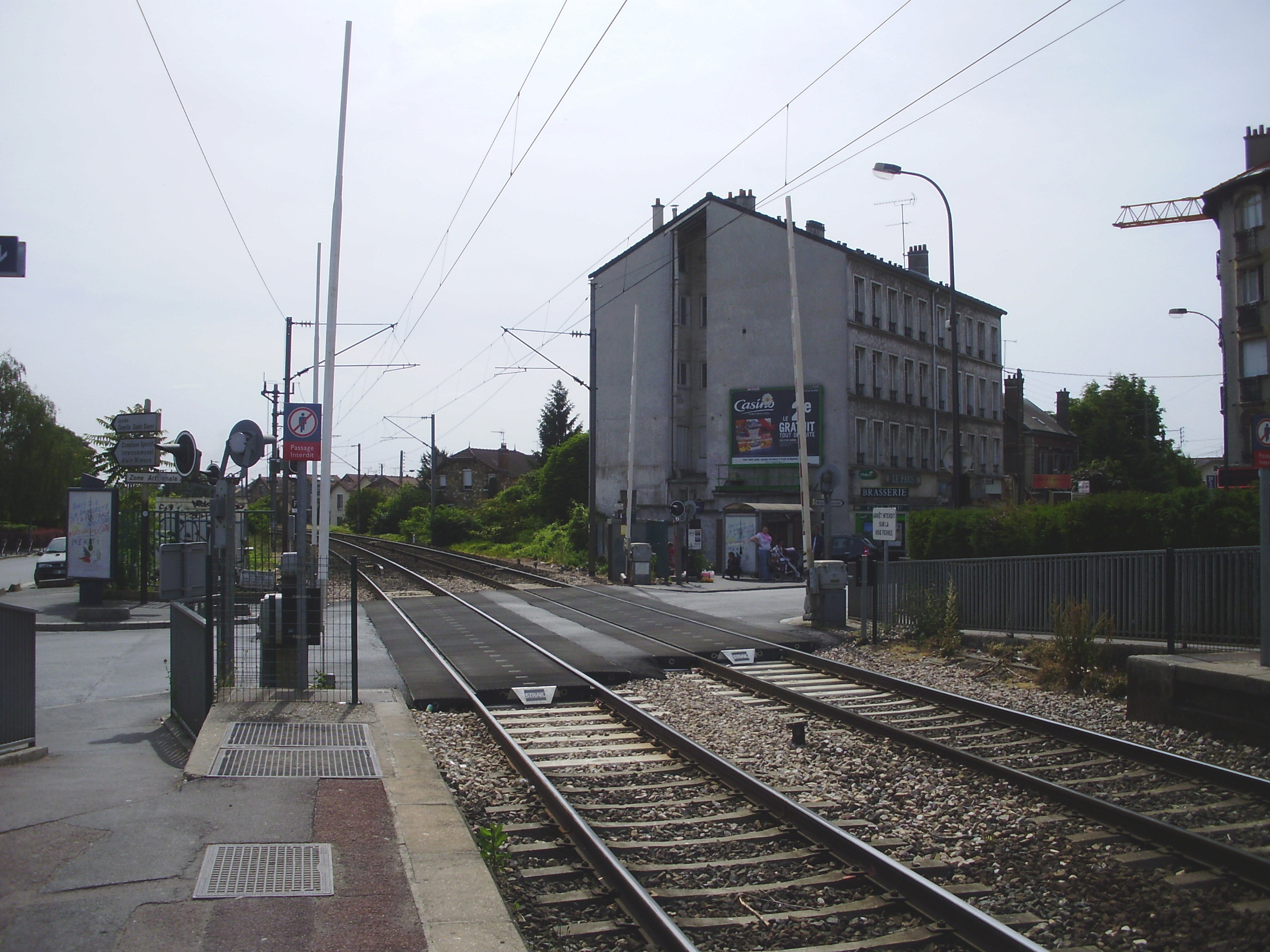 Gare de Deuil - Montmagny, à Deuil-la-Barre, Val-d'Oise, France : passage à niveau ouvert au sud-ouest de la gare, vu depuis le quai pour la gare de Paris-Nord